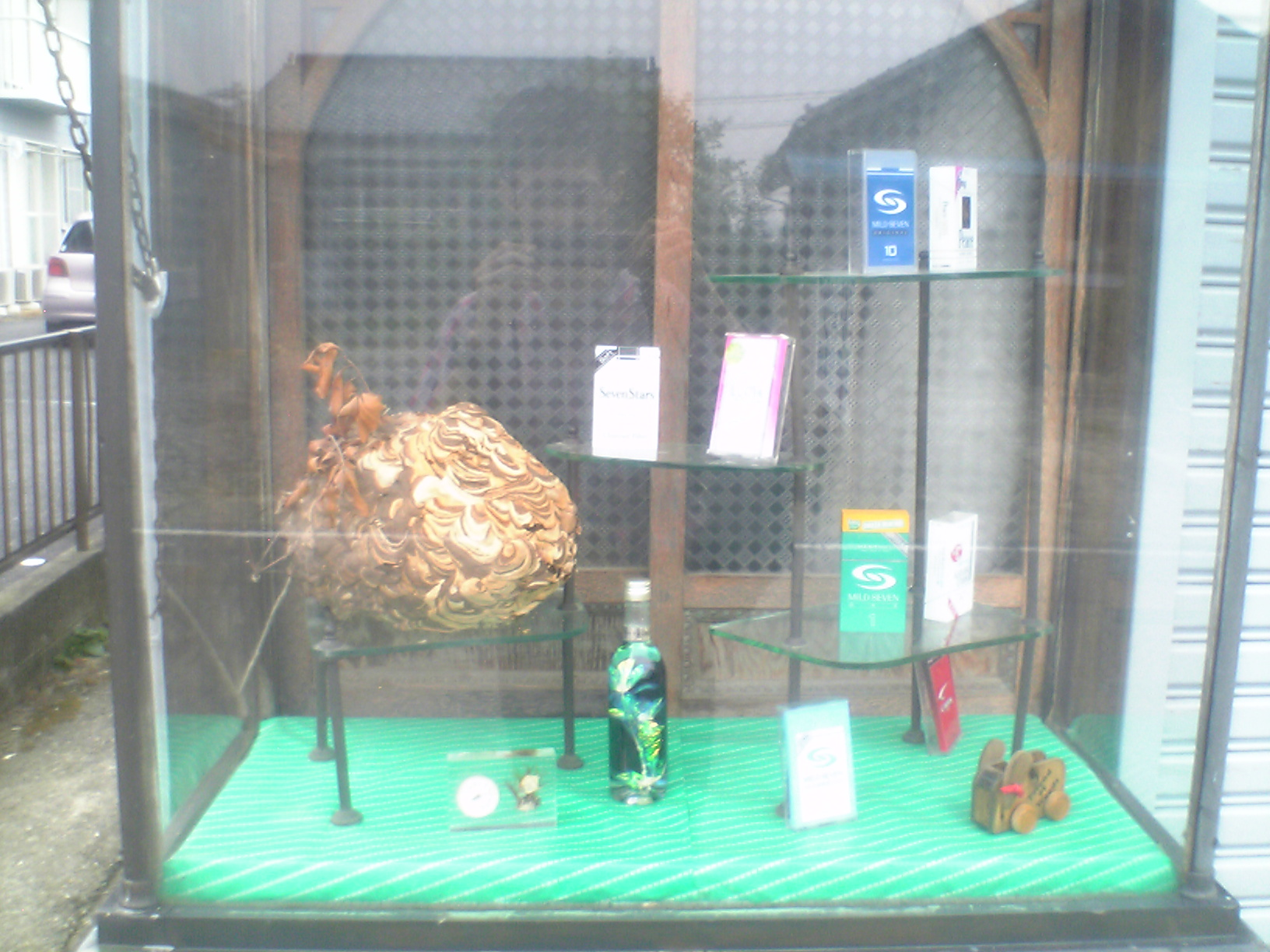 装飾品として展示されるスズメバチの巣 （三重県四日市市）